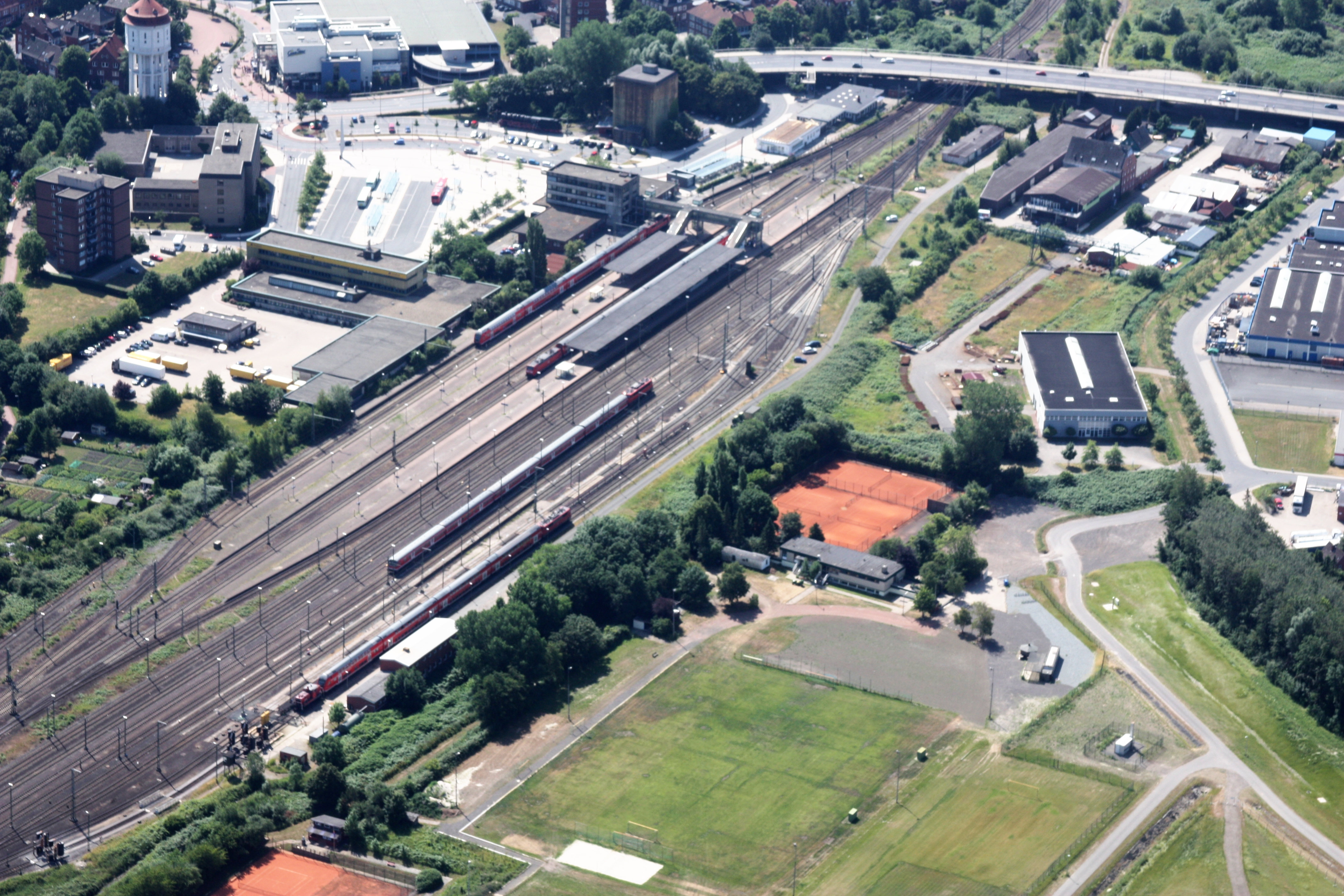 Flug über Emden; Flughöhe 1500 ft; Juli 2010; Originalfoto bearbeitet: Tonwertkorrektur und Bild geschärft mit Hochpassfilter